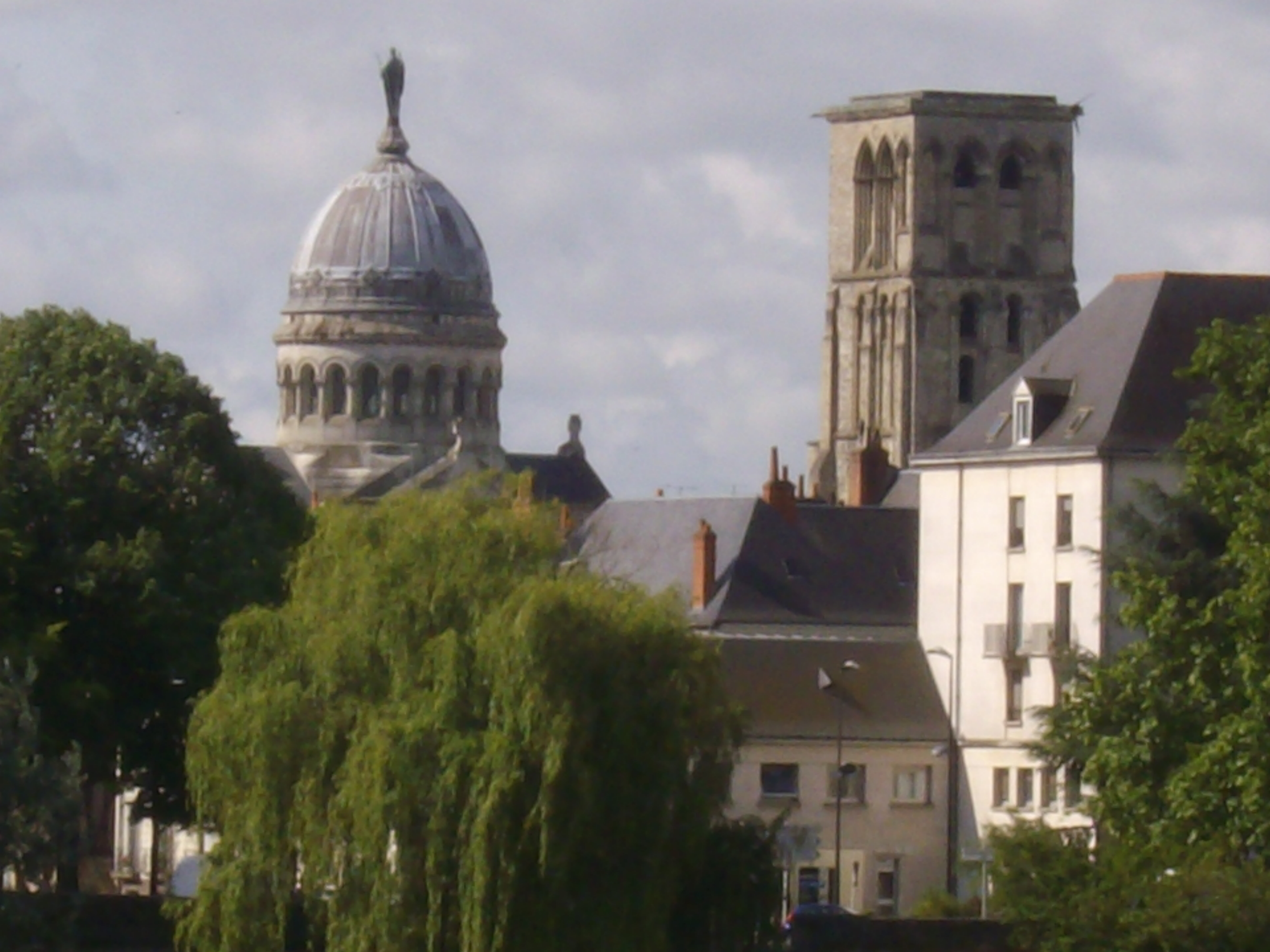 La Basilique et la Tour Charlemagne depuis l'île Simon - Tours